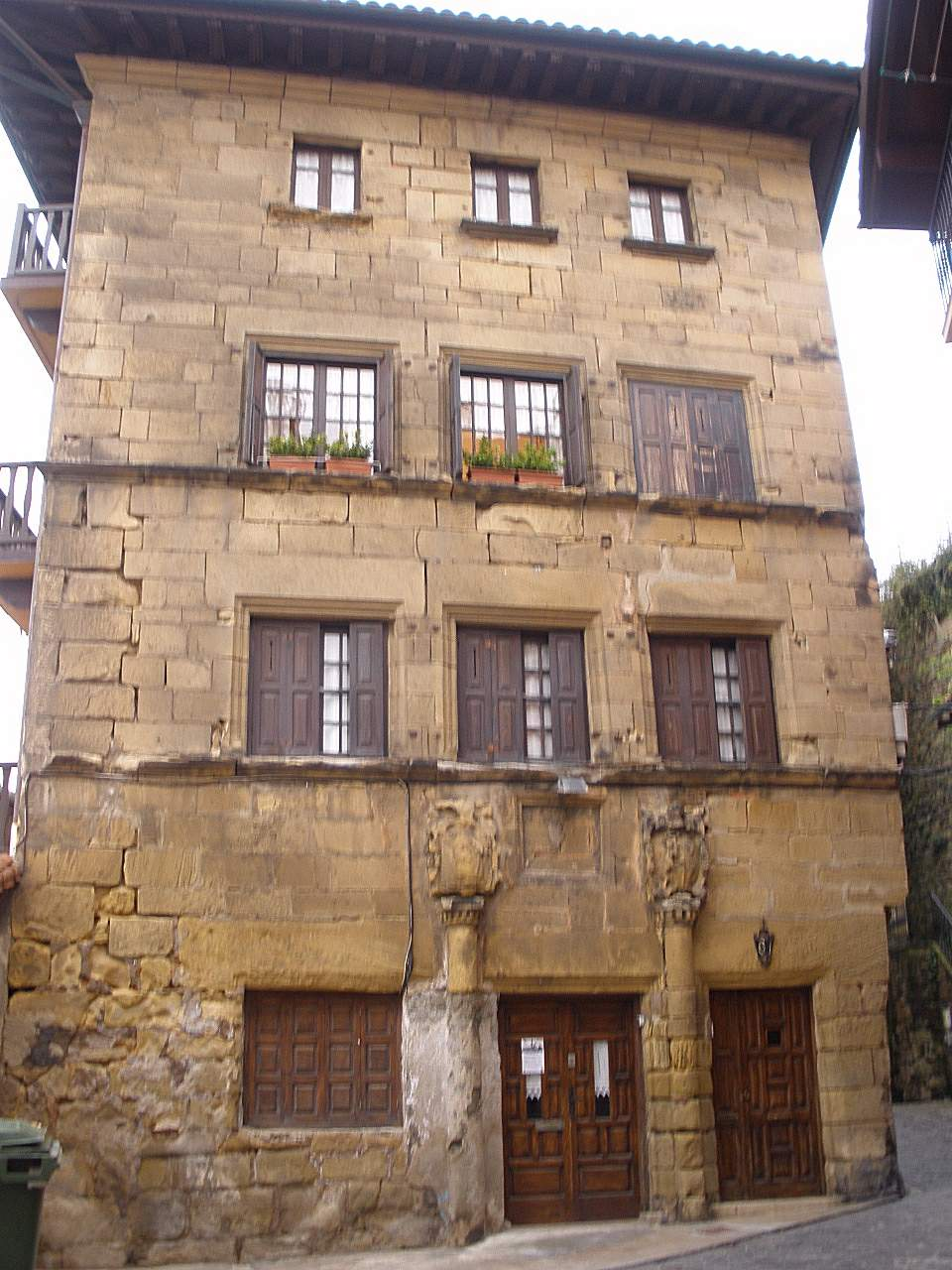 Pasajes de San Juan - Casa de Miranda (Mirandatarren etxea)